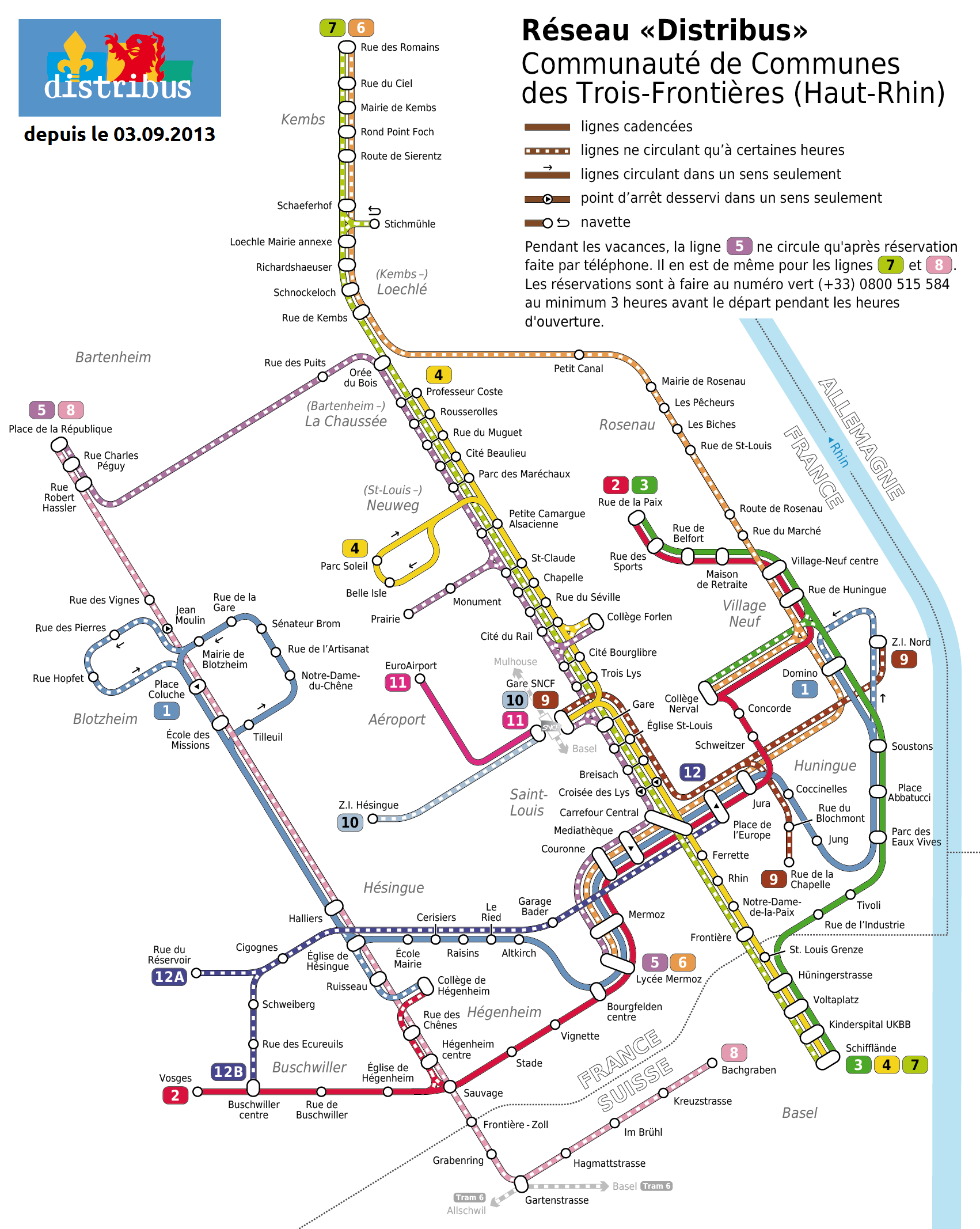 Réseau des transports publics 'Distribus' de Saint-Louis (Haut-Rhin) depuis le 3 septembre 2013